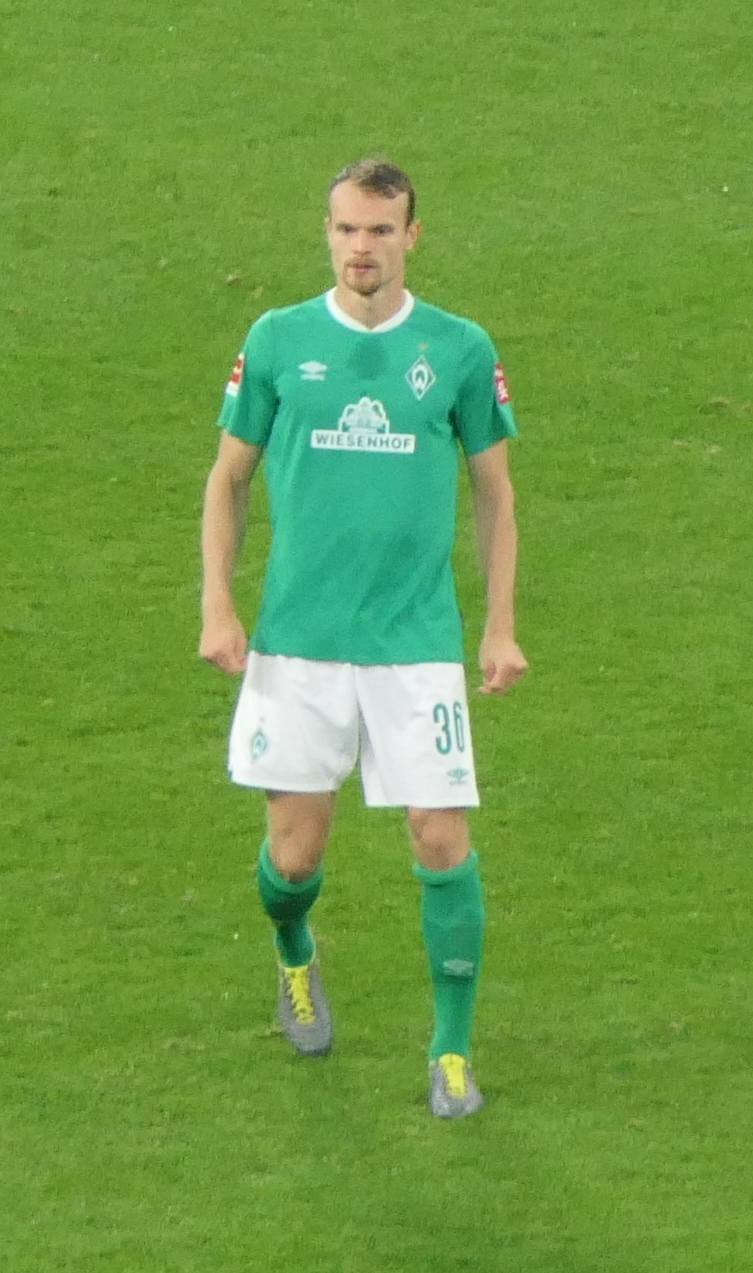 Der Fussballprofi Christian Groß im Trikot vom SV Werder Bremen beim Auswärtsspiel gegen Borussia Dortmund am 28.09.2019.